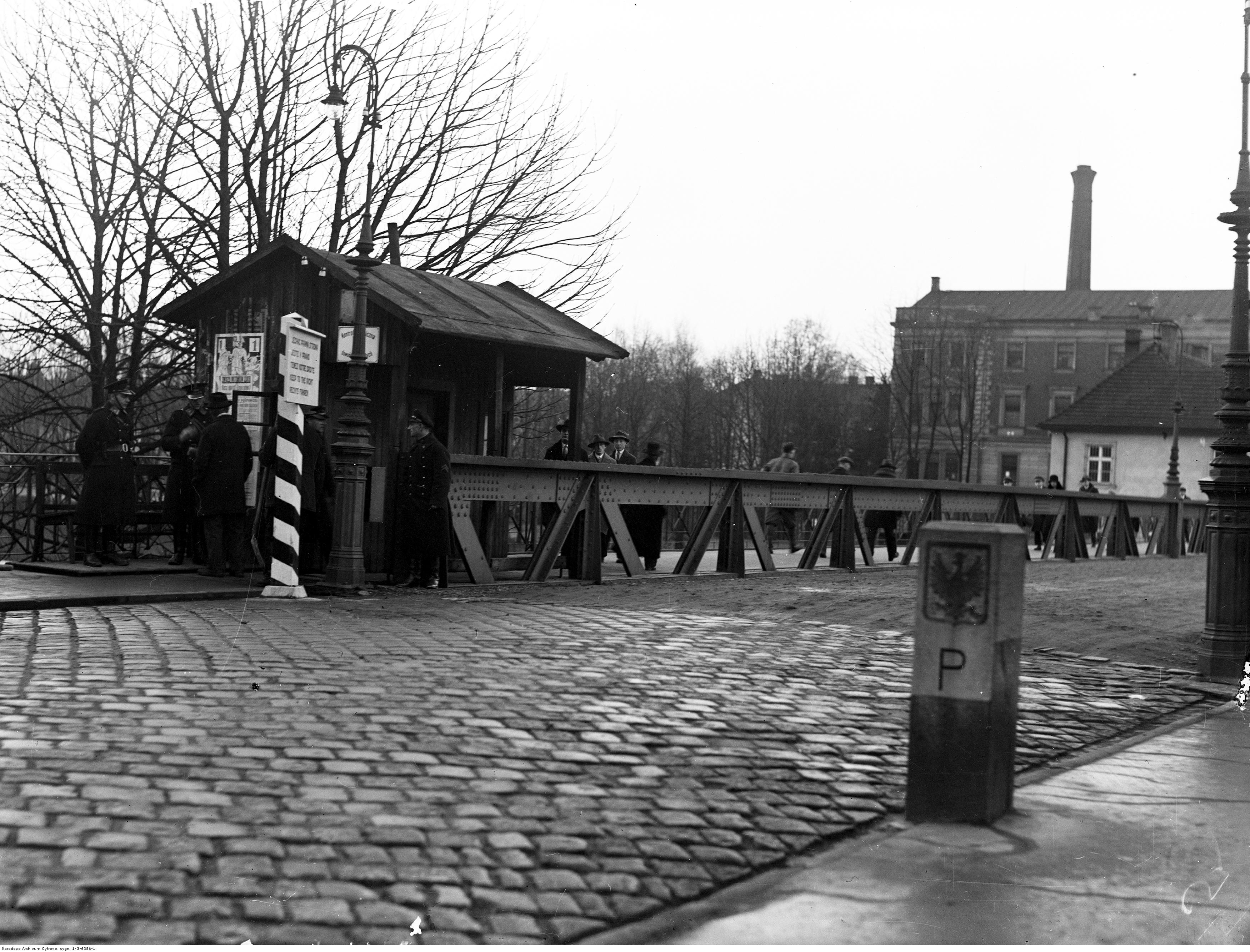 Posterunek Straży Granicznej na moście w Cieszynie (granica z Czechosłowacją); 1928 r. Koncern Ilustrowany Kurier Codzienny - Archiwum Ilustracji. Sygnatura: 1-G-6386-1